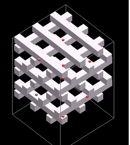 Եռաչափ ֆոտոնային բյուրեղի օրինակ